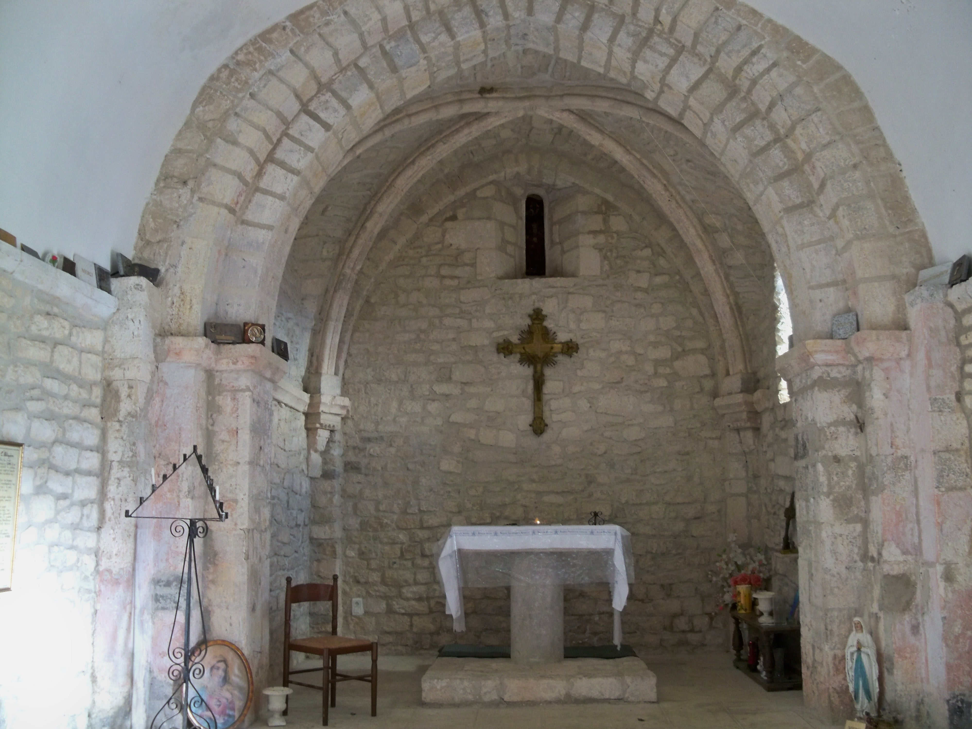 Nef de la chapelle Notre-Dame de l'Ortiguière (Revest du Bion)